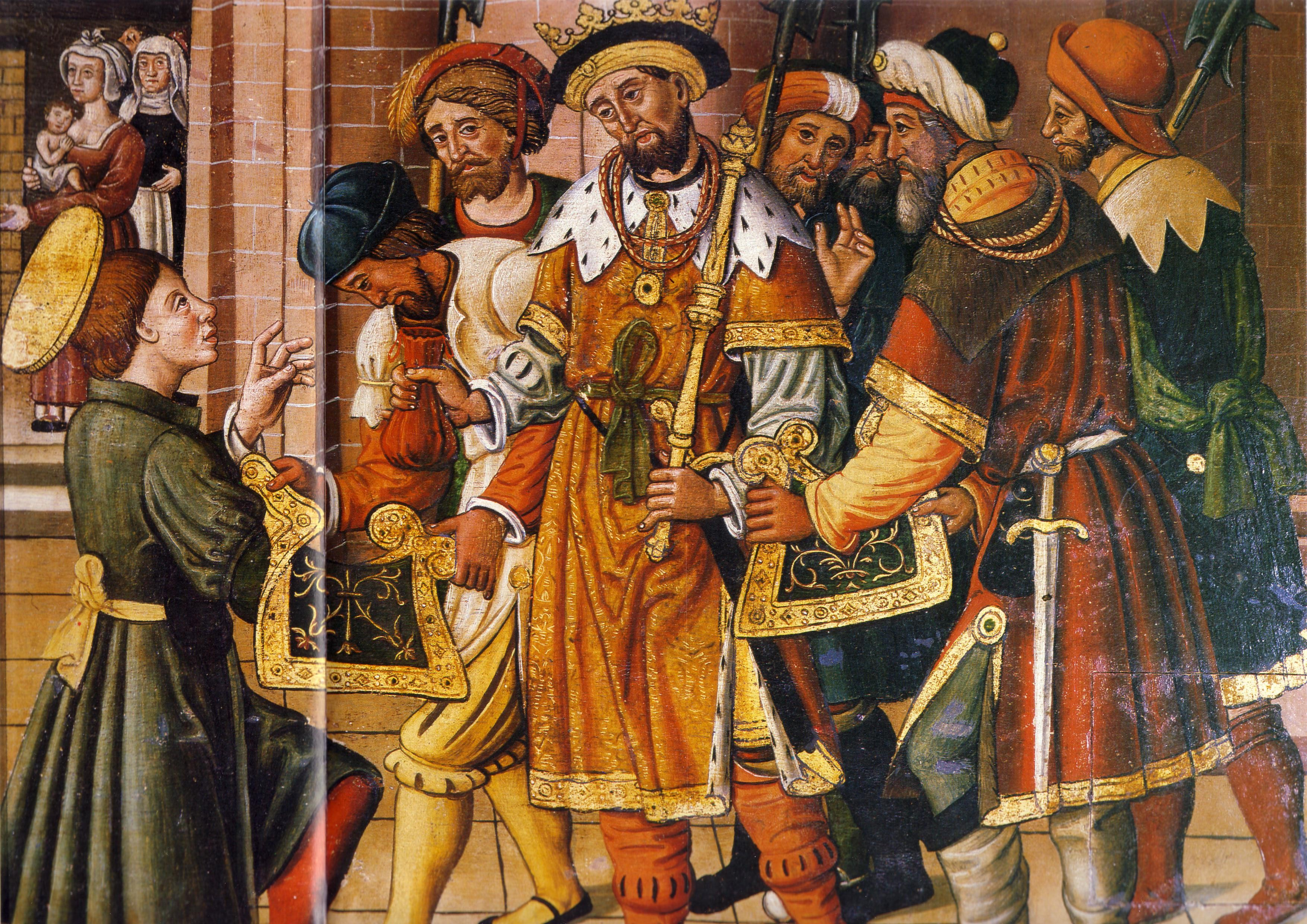 Saint Eloi remettant au roi Clotaire II, deux selles faites par lui. Un artiste du XVe siècle a traduit le mot sella de manière erronée, conduisant à représenter le saint donnant deux selles à Clotaire II. Triptyque du XVe siècle, Poitiers.